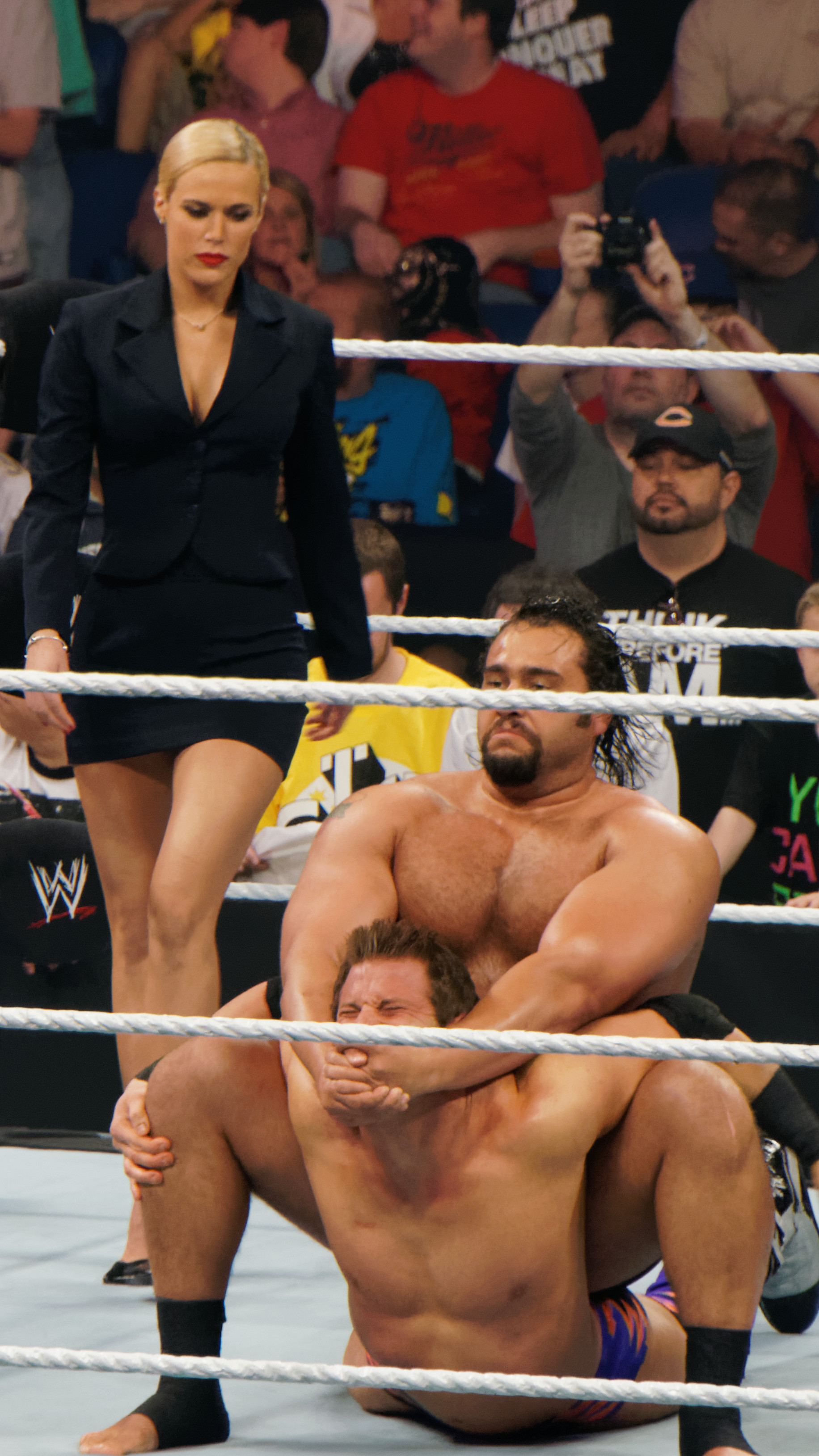 2014-04-07_20-51-54_NEX-6_1462_DxO